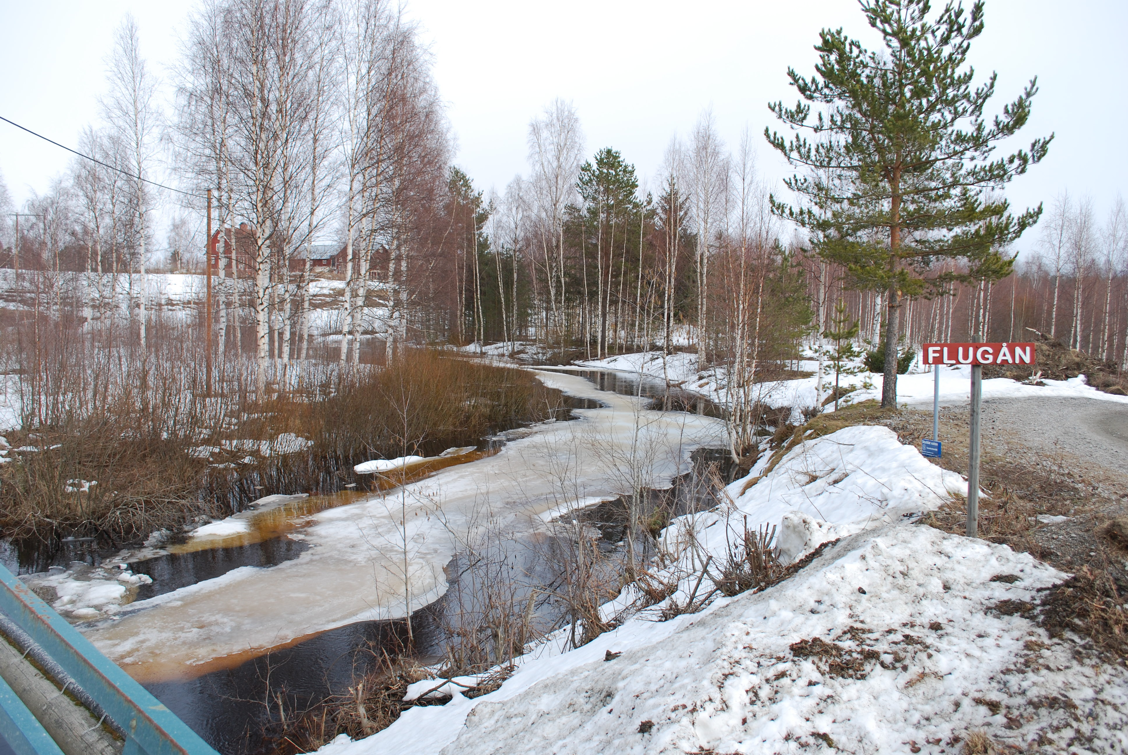 Vy över Flugån vid bron vid Västansjö där Ängesvägen ansluter till byvägen. Bilden är tagen den 5 april 2009 och visar vy från bron mot öster, marken är fortfarande delvis snötäckt likaså ån har kvar lite snötäckt is i vänstra kanten. I förgrunden till höger syns Ängesvägen, uppe på höjden till vänster i bild skymtar man bakom några björkar gården Lillsves.